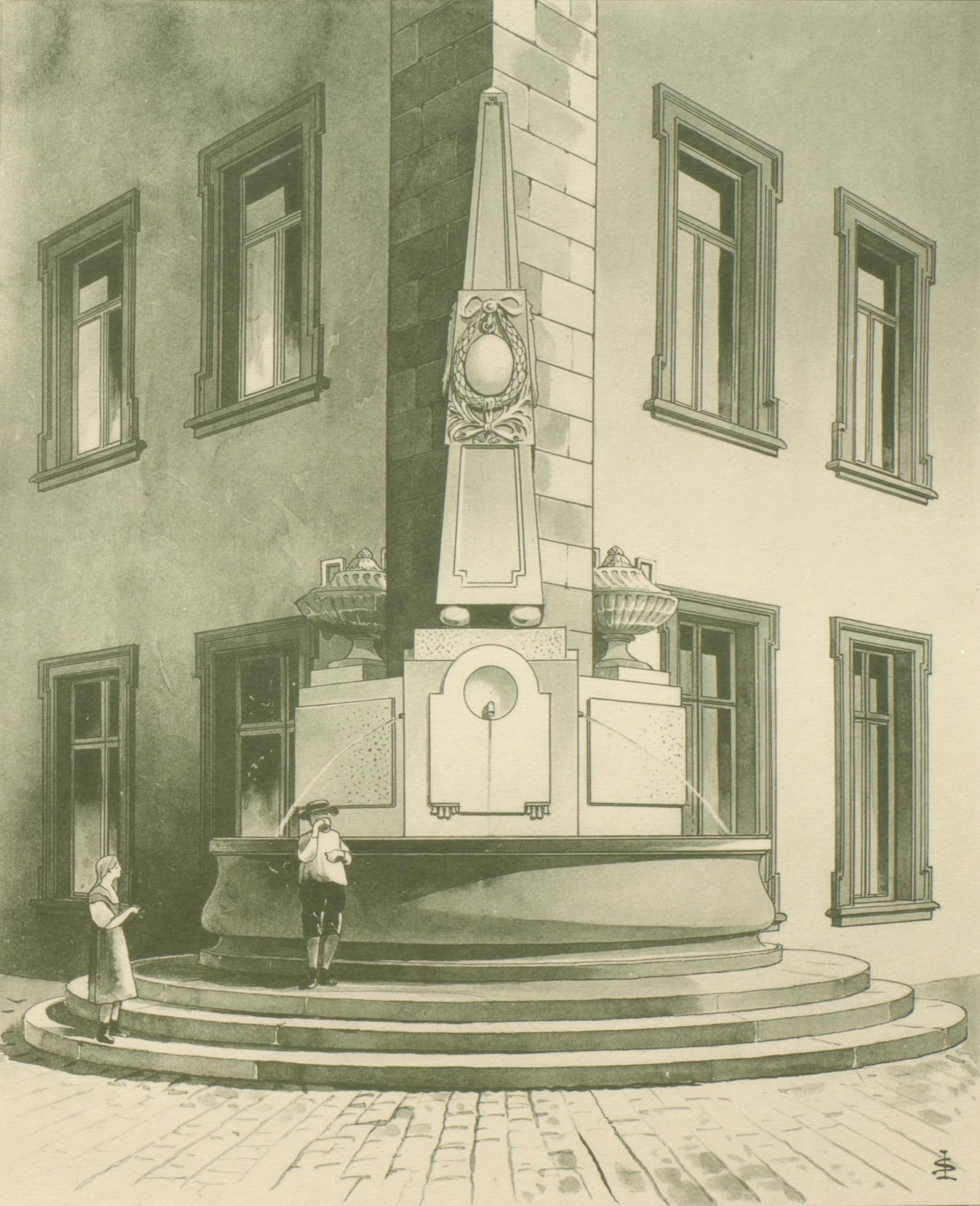 Kanzleibogenbrunnen an der Ecke Alte Kanzlei (links) und Prinzenbau an der Planie in Stuttgart.